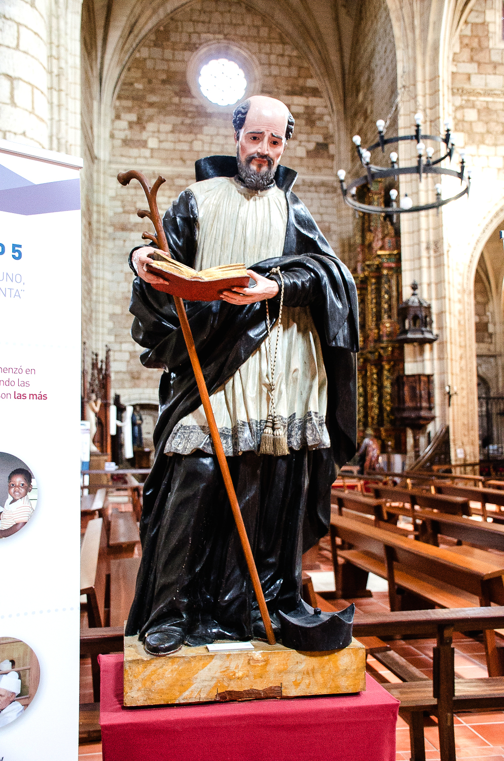 Imagen de San Juan de Ortega. Autor: Juan Javier Romero. Policromía. Año 1787. Dimensiones 140 x 74 x 55 cm. Parroquia de San Martín Obispo, de Quintanaortuño. San Juan de Ortega, nacido en Quintanaortuño en 1080, fue un religioso español, discípulo de Santo Domingo de la Calzada. Exposición de arte sacro «Sementera de Esperanza», Melgar de Fernamental, julio de 2020.